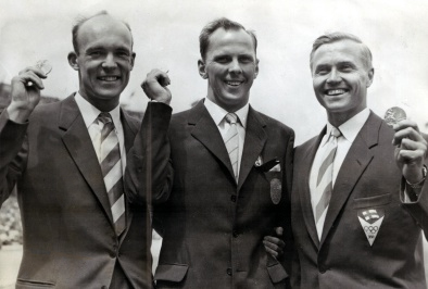 Olavi Mannonen, Lars Hall, Väinö Korhonen